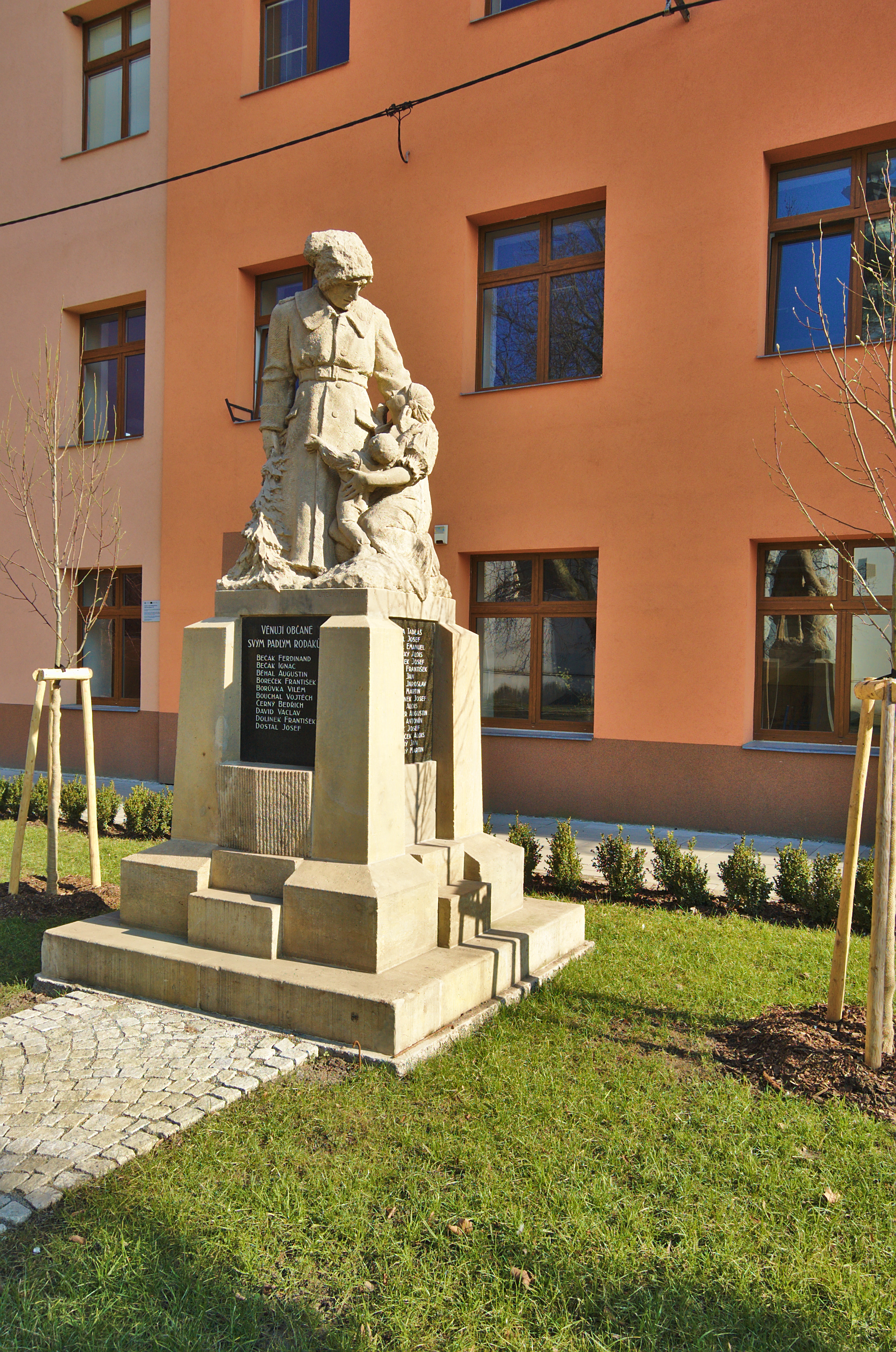 Památník padlým občanům, Olšany, okres Prostějov